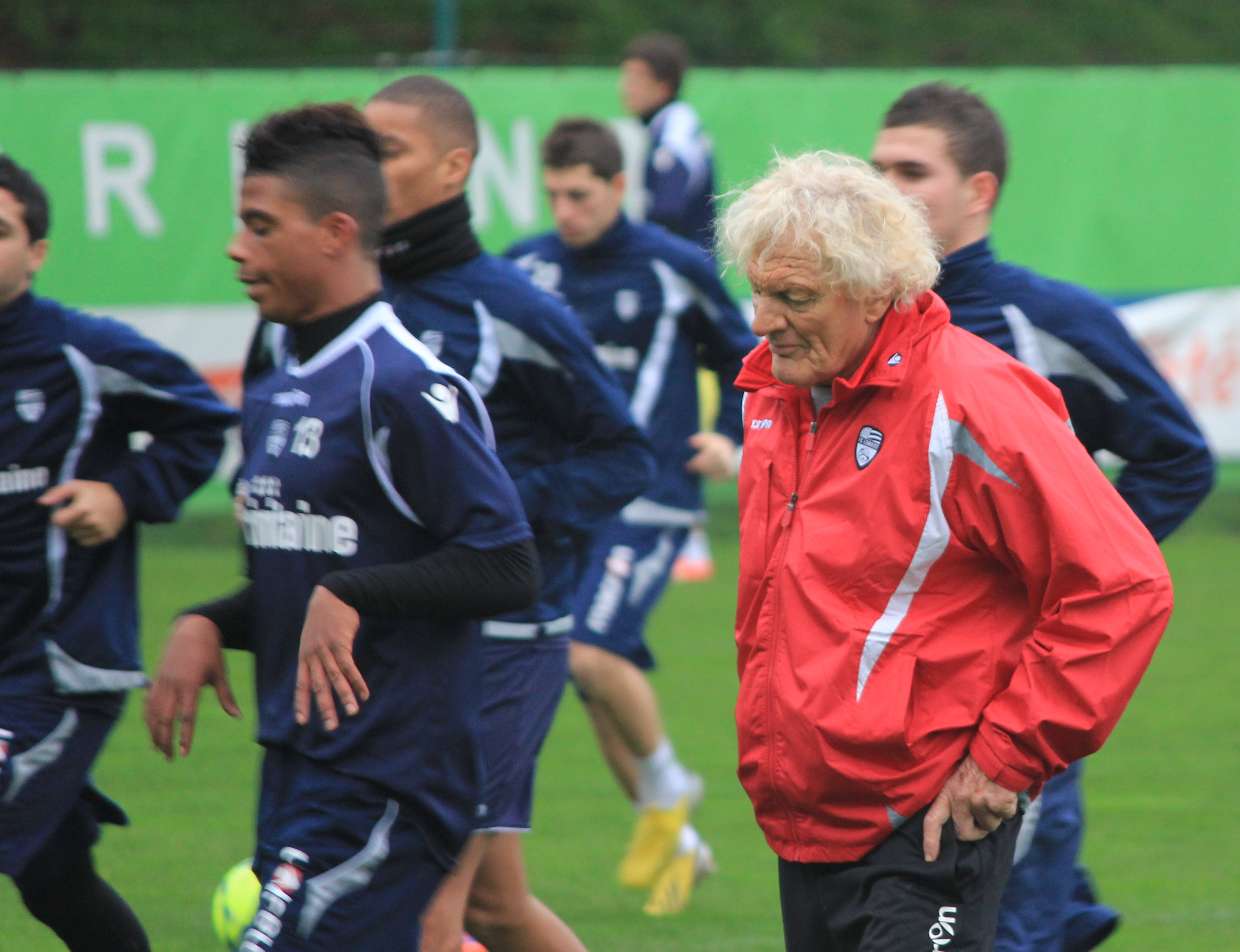 Tiburce darou pendant un entrainement du FC Lorient le 3 janvier 2012